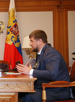 Глава региона доложил Президенту России о готовности республиканских школ к началу учебного года. Обсуждалась также экономическая и политическая ситуация в республике.